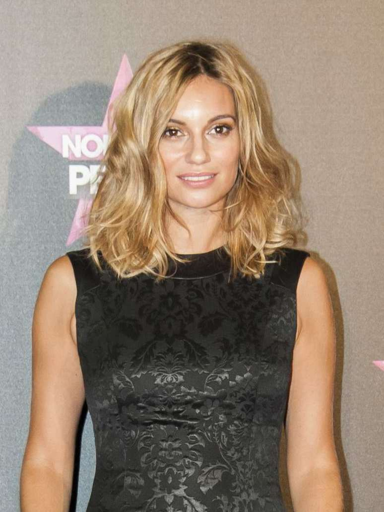 Fotos del photocall y fiesta de lanzamiento de un nuevo canal de televisión en España.